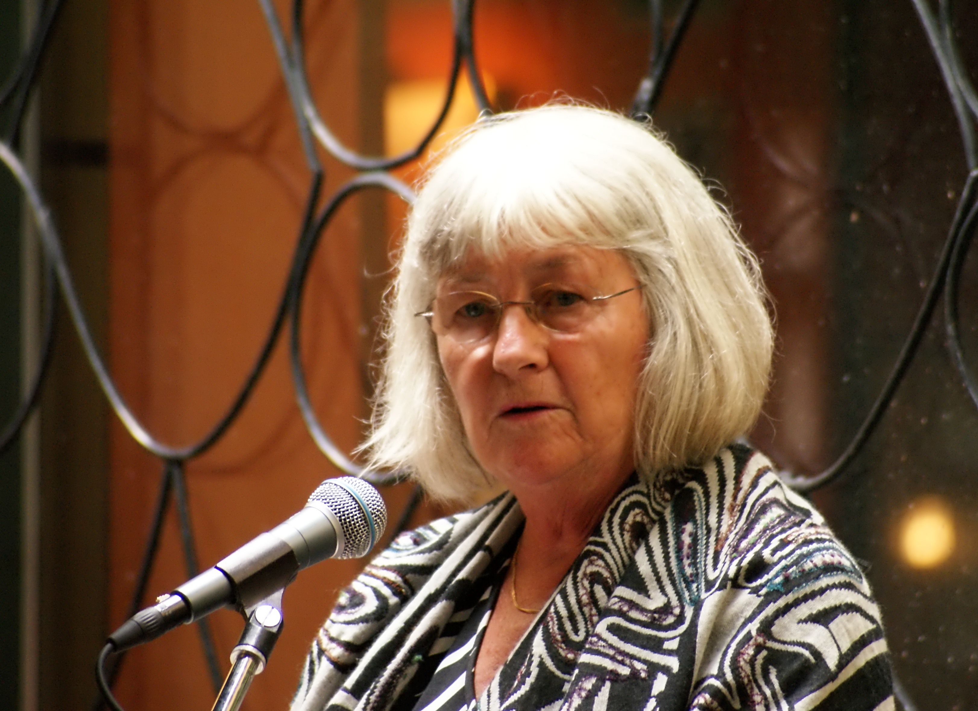 Barbro Lindgren på Stockholms Kulturfestival 2010